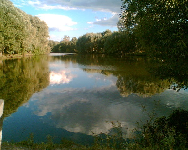 Озеро (пруд) в центре деревни Папсуевка